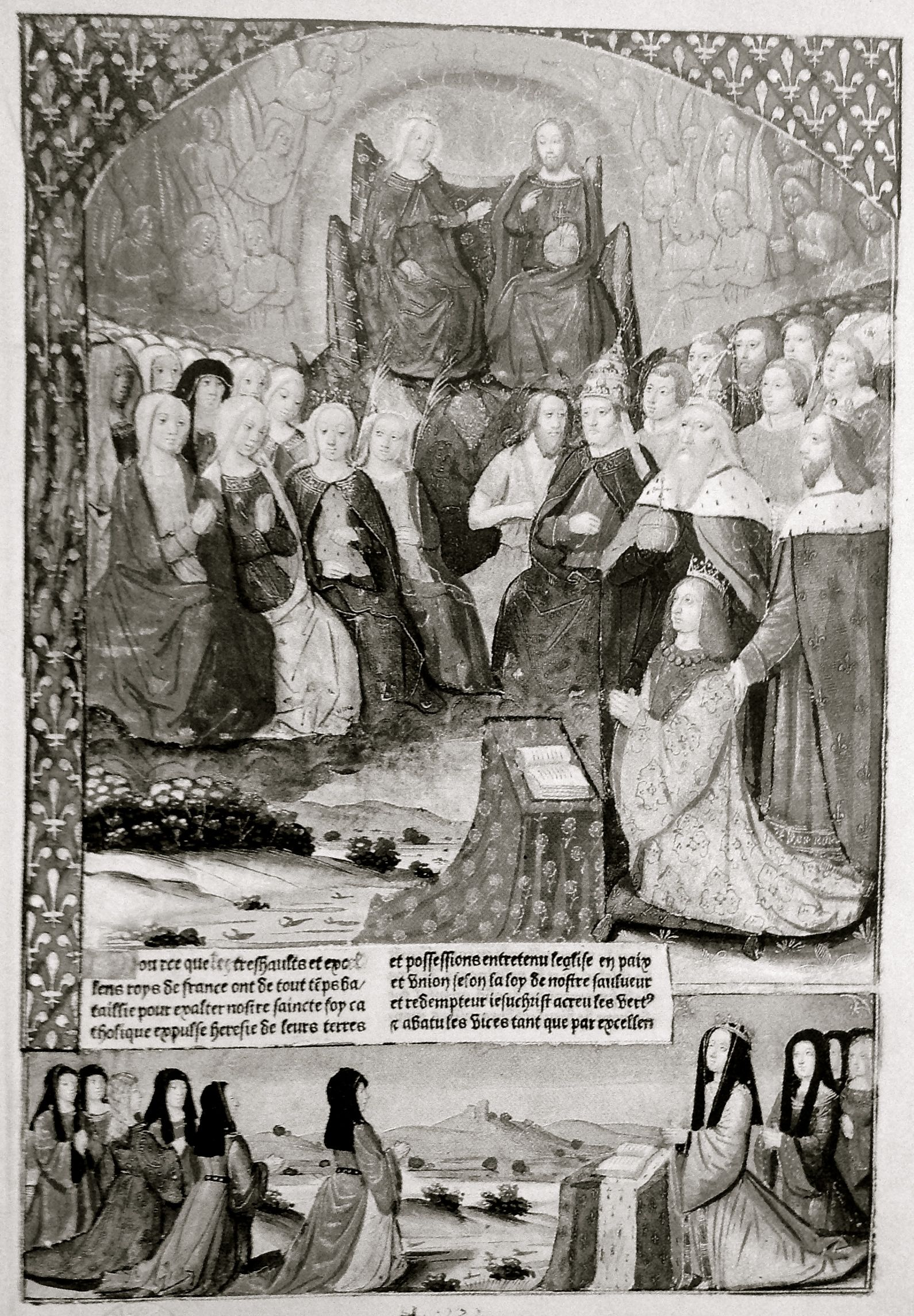 Légende dorée fol93v